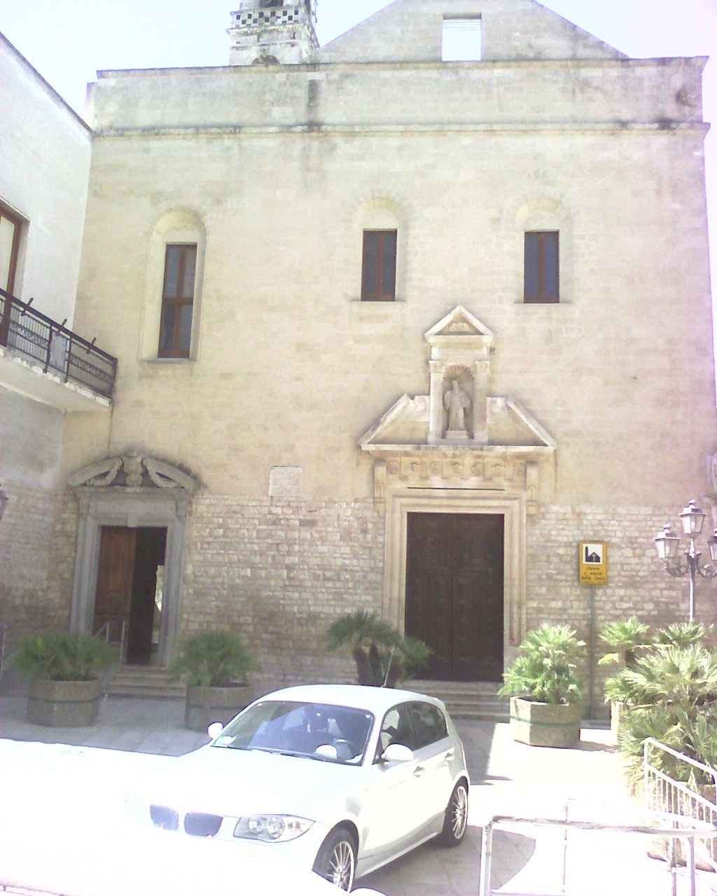 chiesa s.maria della croce-Modugno (bari)-italy